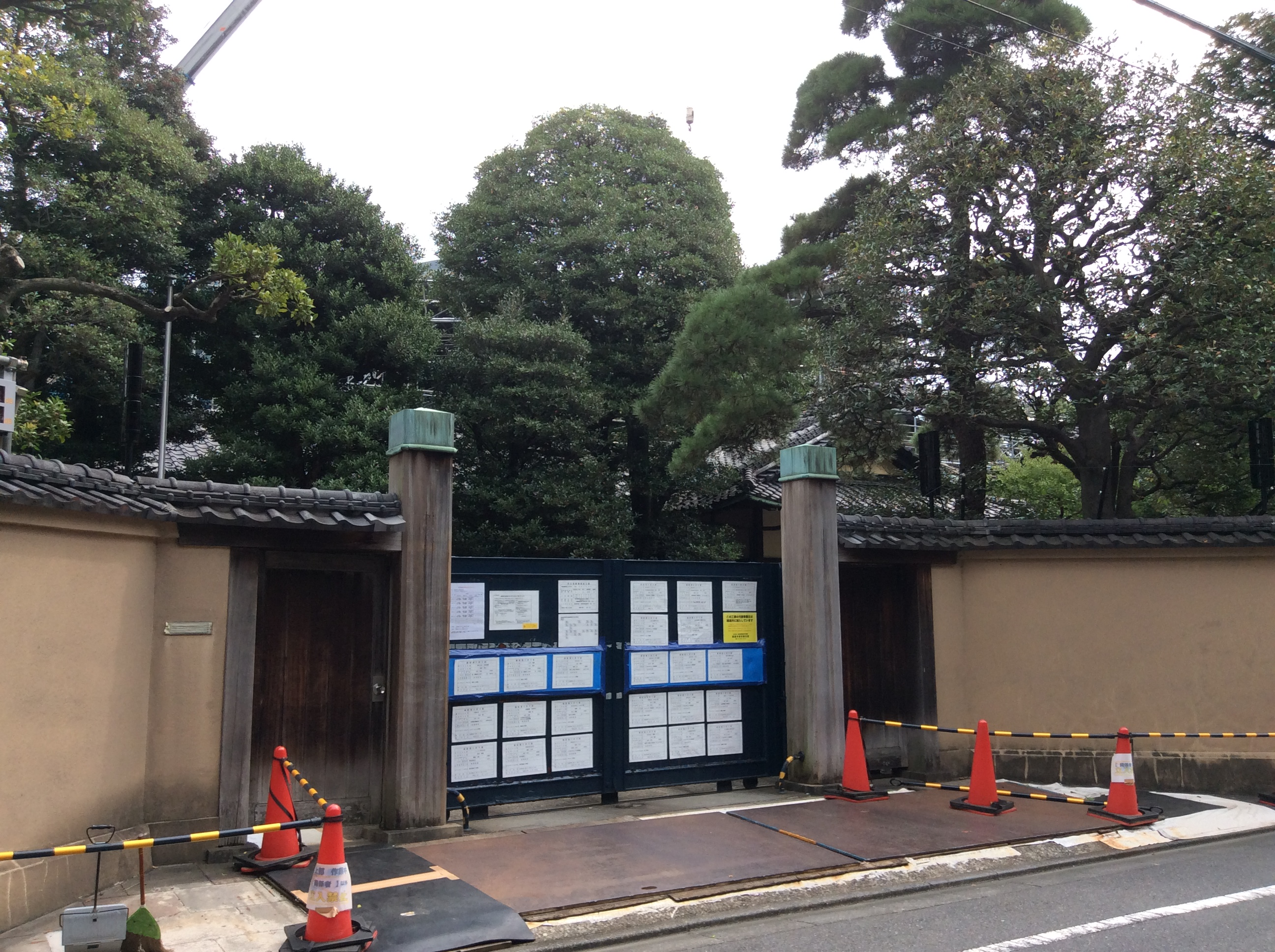 最高裁判所長官邸